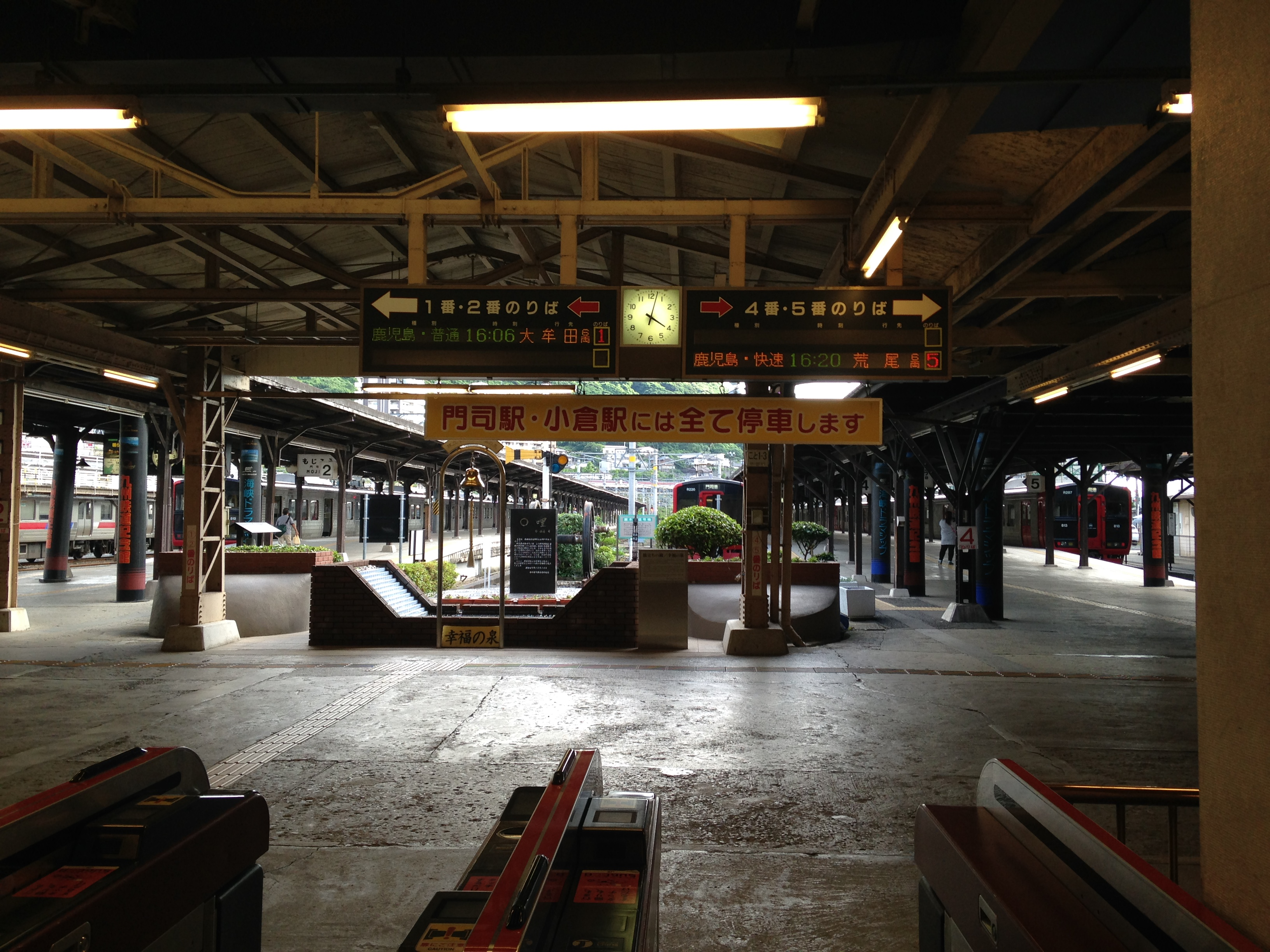 門司港駅の改札口と発車標